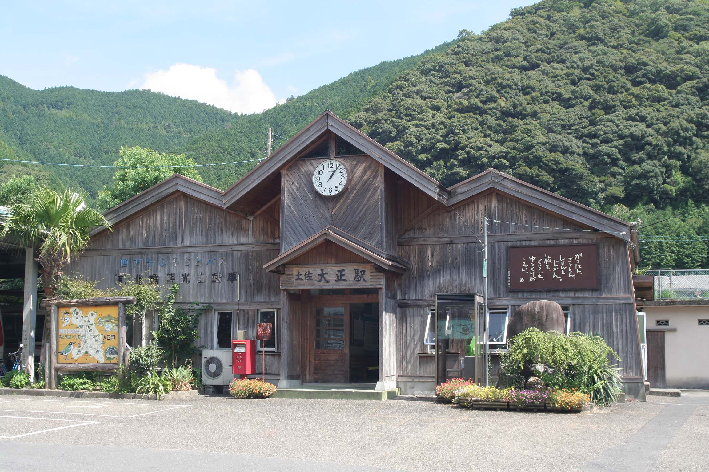 JR四国、土佐大正駅の駅舎